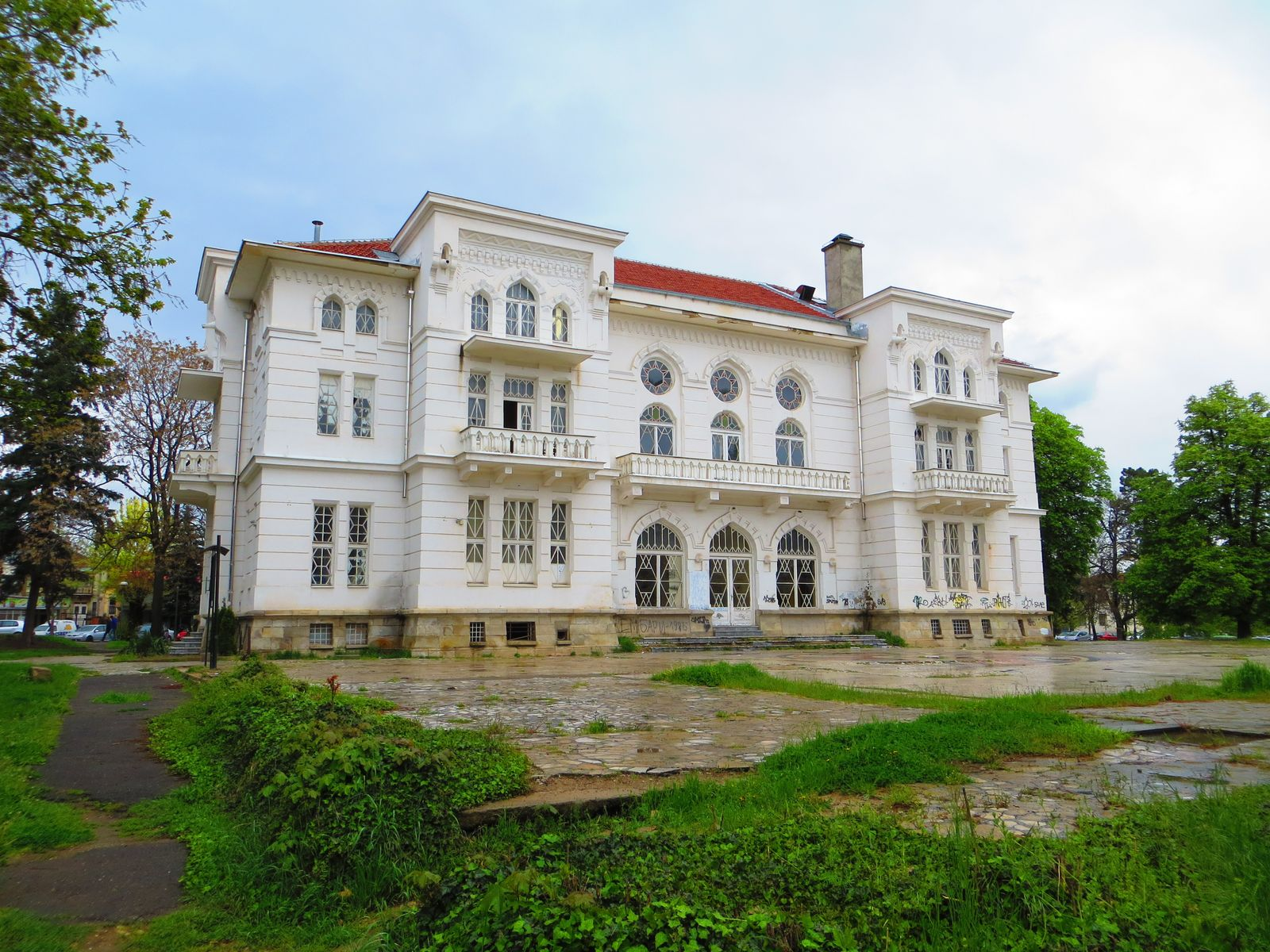 Bitola